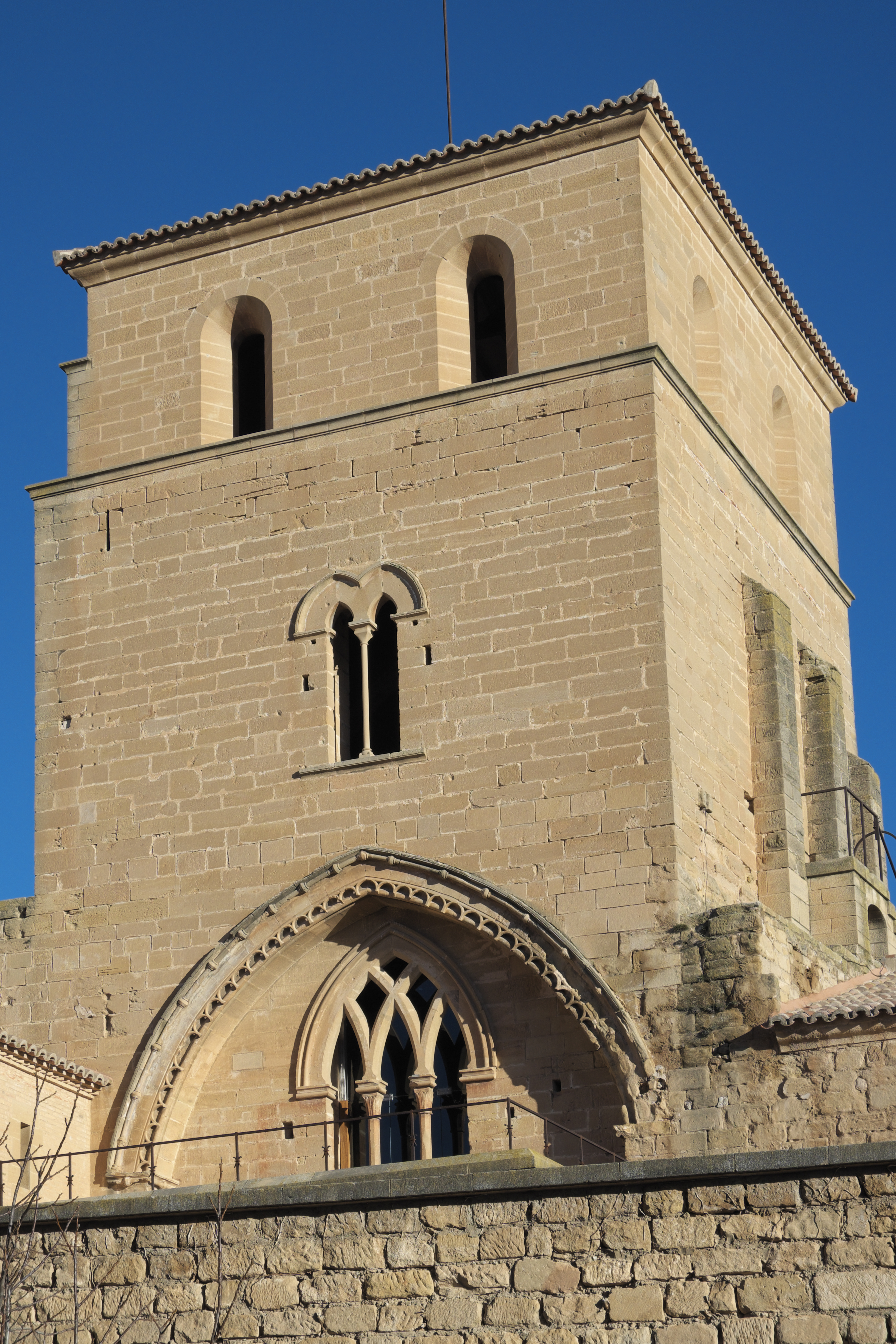 Castillo-Convento von Alcañiz in der Provinz Teruel (Aragonien/Spanien), Torre del homenaje